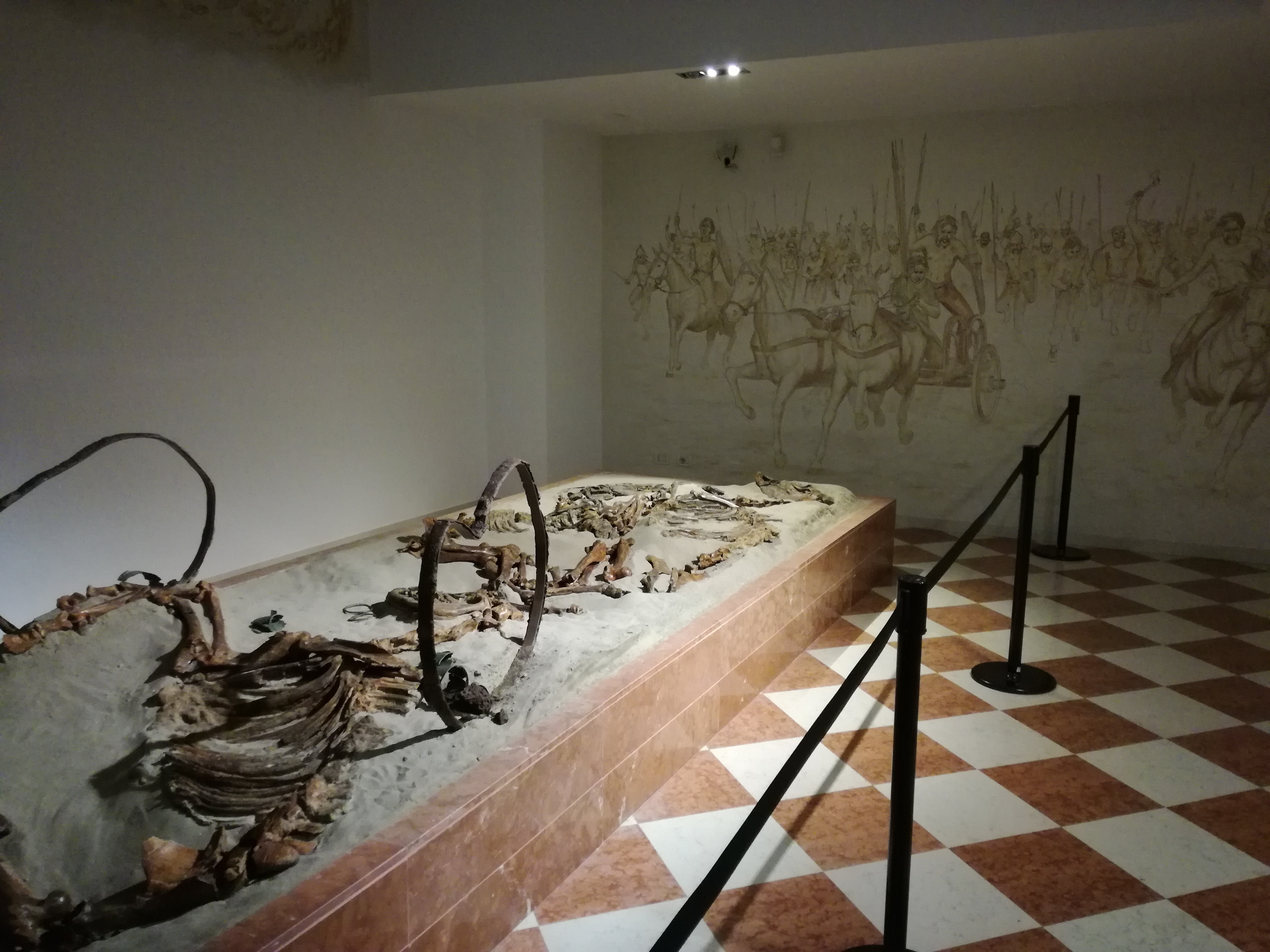 Tomba della biga al Museo Archeologico di Adria, visione dal basso con affreschi in richiamo all'opera.